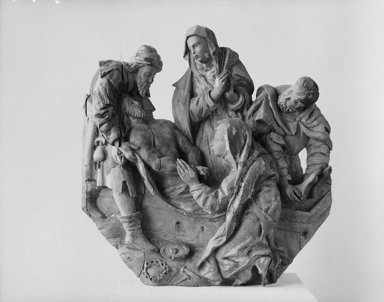 Skulptur i trä. Motiv: Kristi gravläggning. Relativ datering 1500 - 1600-tal. Kategori: (05) SkulpturerSkulptur i trä. Motiv: Kristi gravläggning. Relativ datering 1500 - 1600-tal.